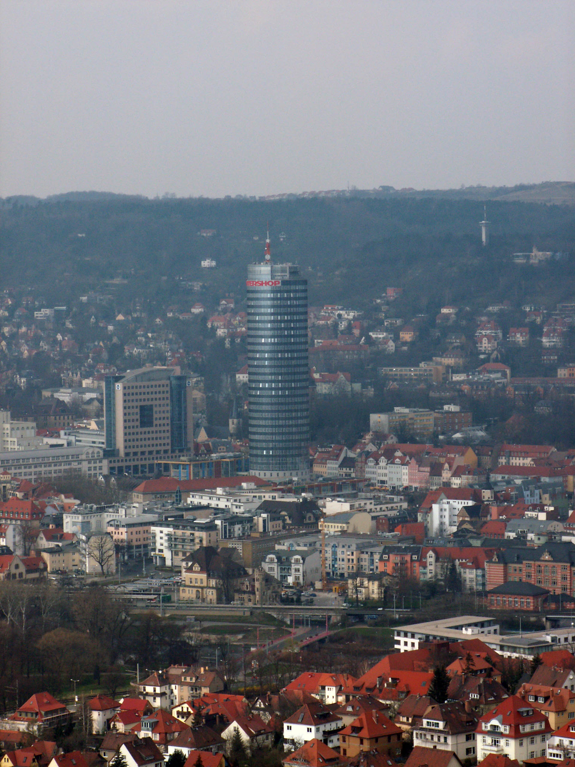 Jena, Blick von der „Sophienhöhe“ (Hummelsberg) auf den JenTower in der Stadt